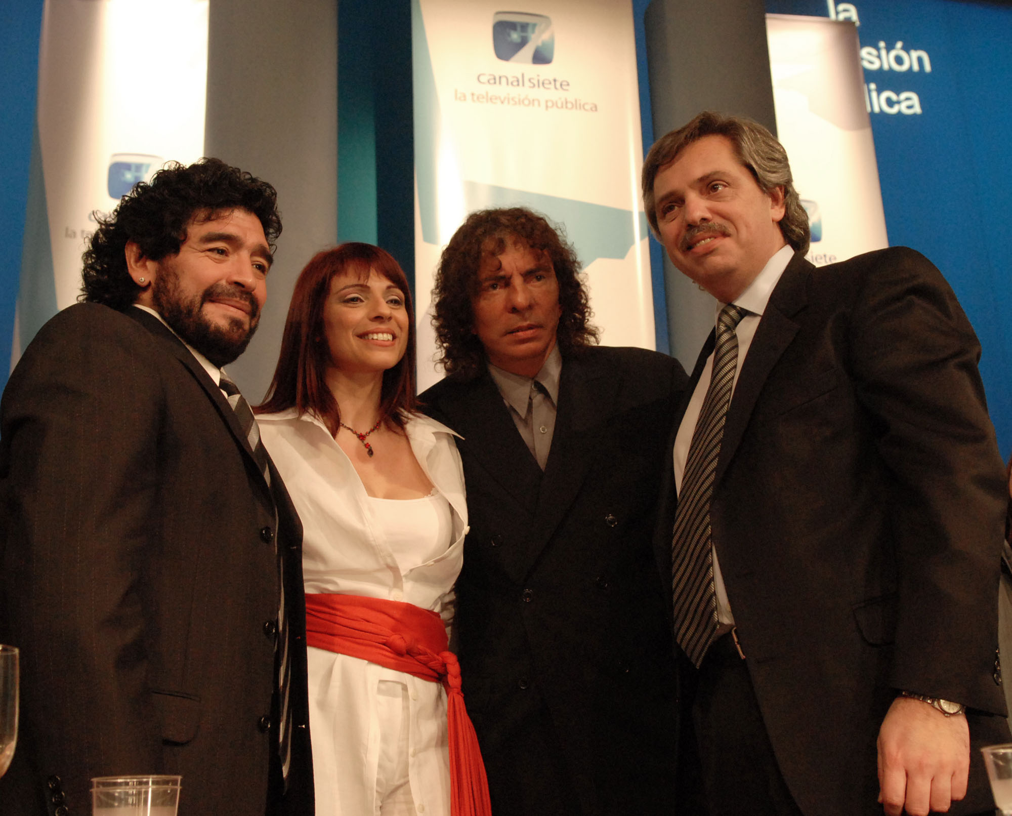 De izquierda a derecha: Diego Maradona, Rosario Lufrano, Alejandro Dolina y Alberto Fernández en la presentación de la nueva presentación de LS82 Canal 7. Foto oficial del jueves 28 de septiembre de 2006.